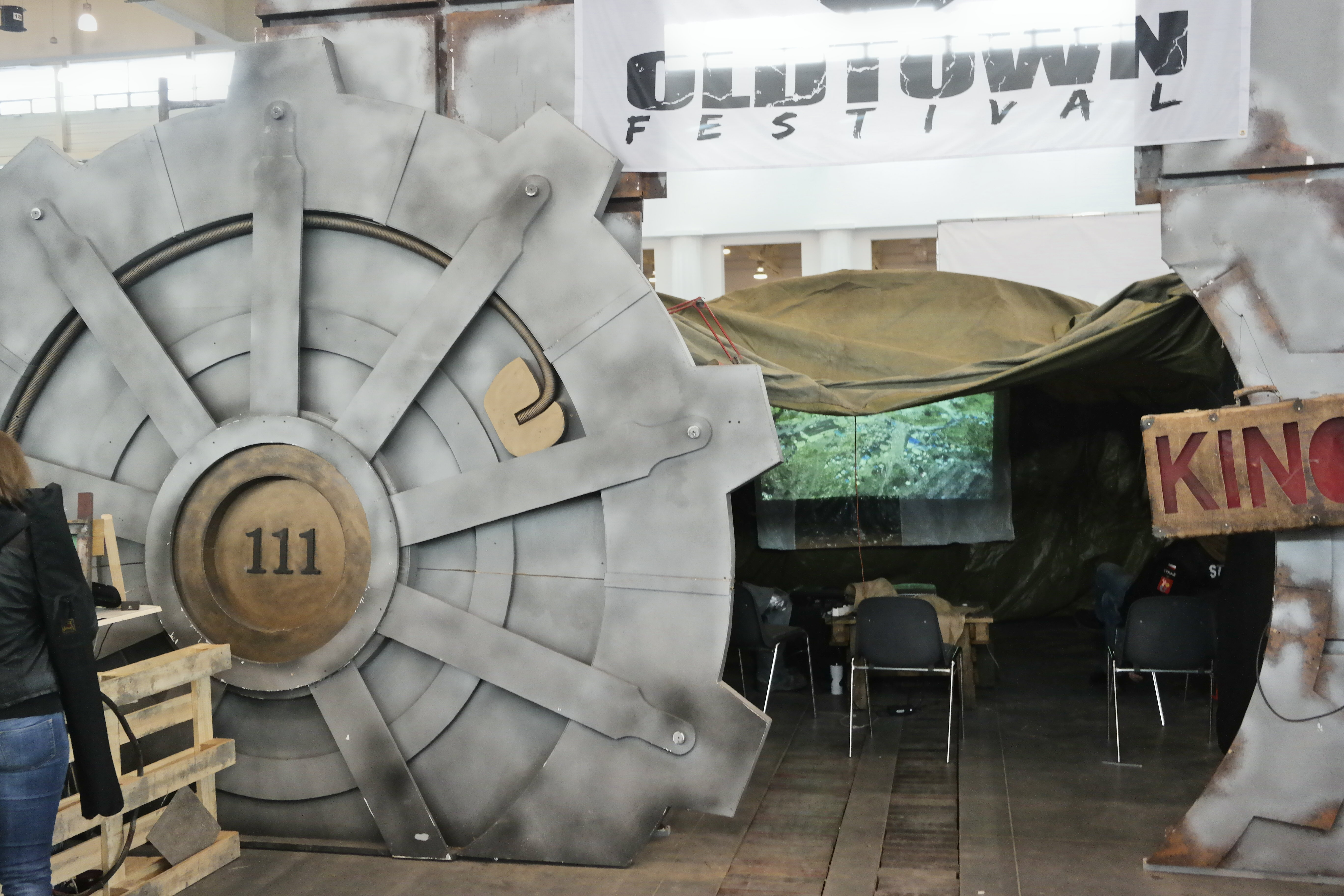 Schron 111, Pyrkon, Poznań, Polska